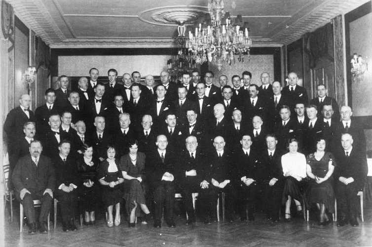 Руководство машиностроительного завода "Францъ Крулль", 1935 год